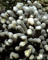 Stylophora sp.